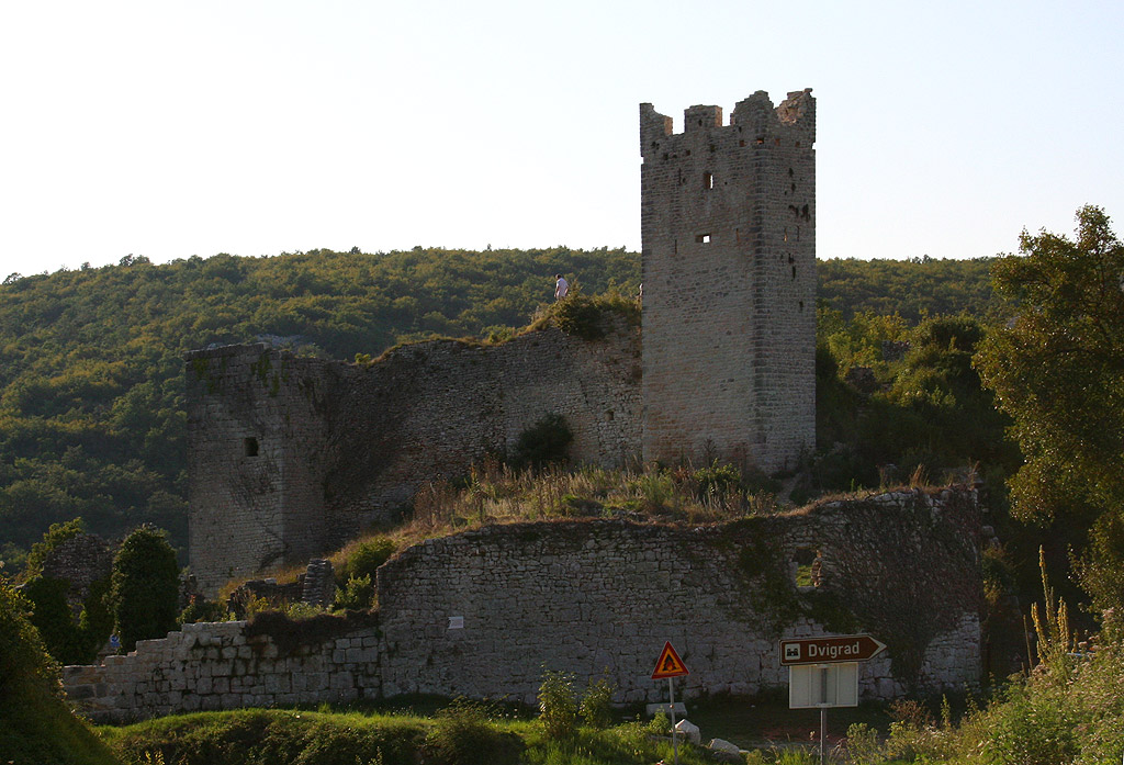 Двиград снаружи Развалины крепости Двиград